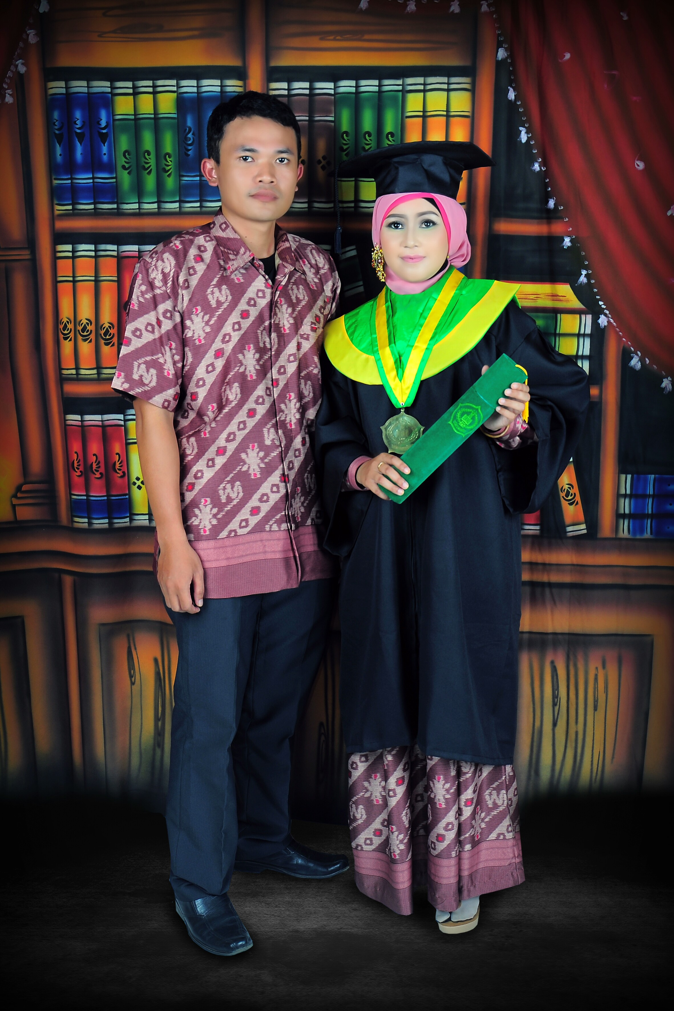 Ship